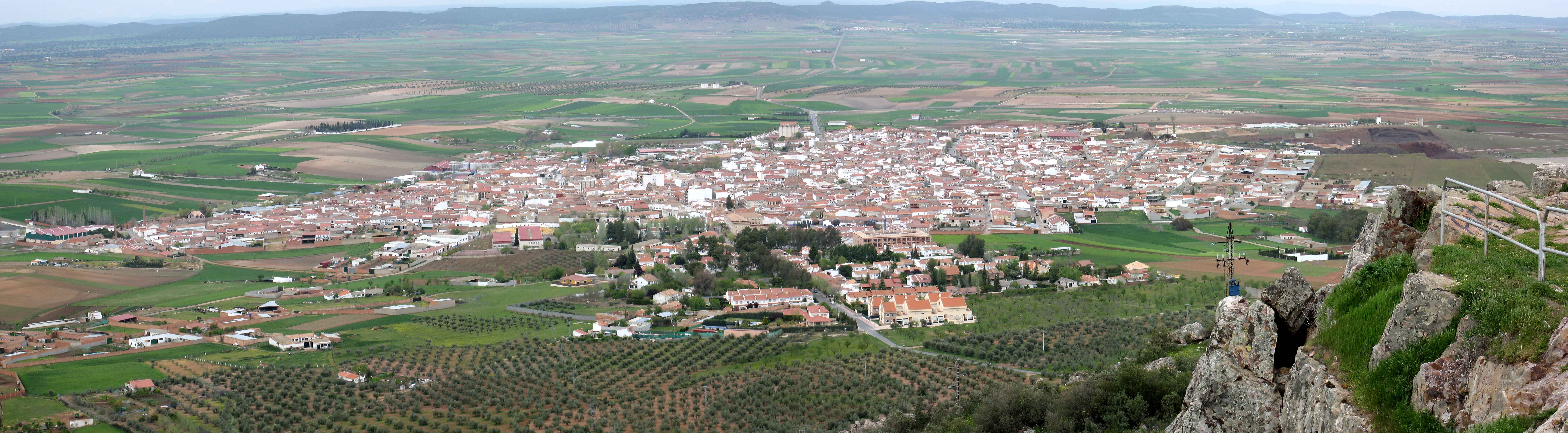 Vista general